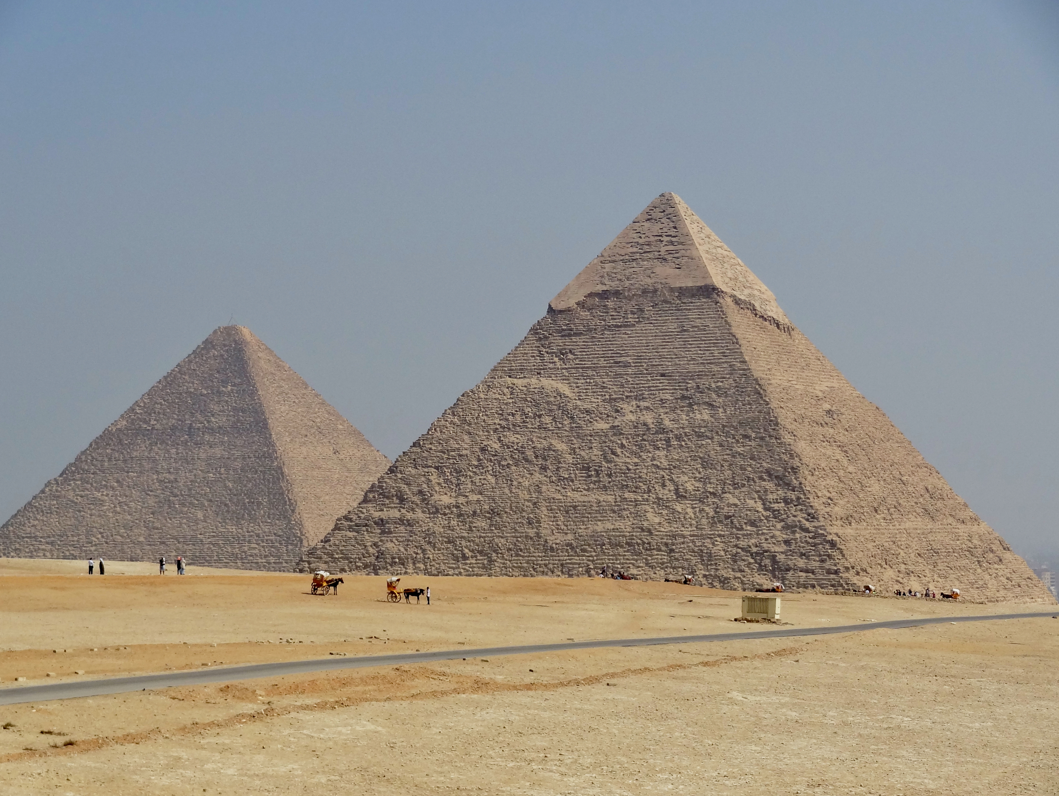 Pyramiden von Giseh, Ägypten